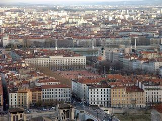 Vue de Lyon depuis la colline de Fourvière